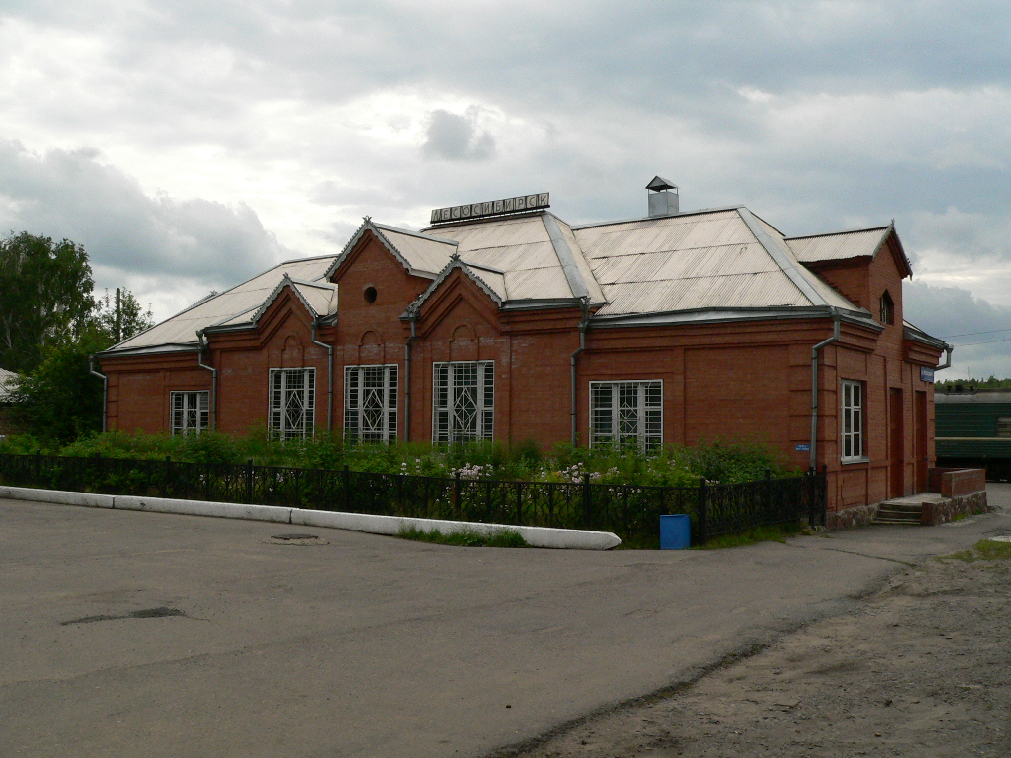 Железнодорожный вокзал Лесосибирска